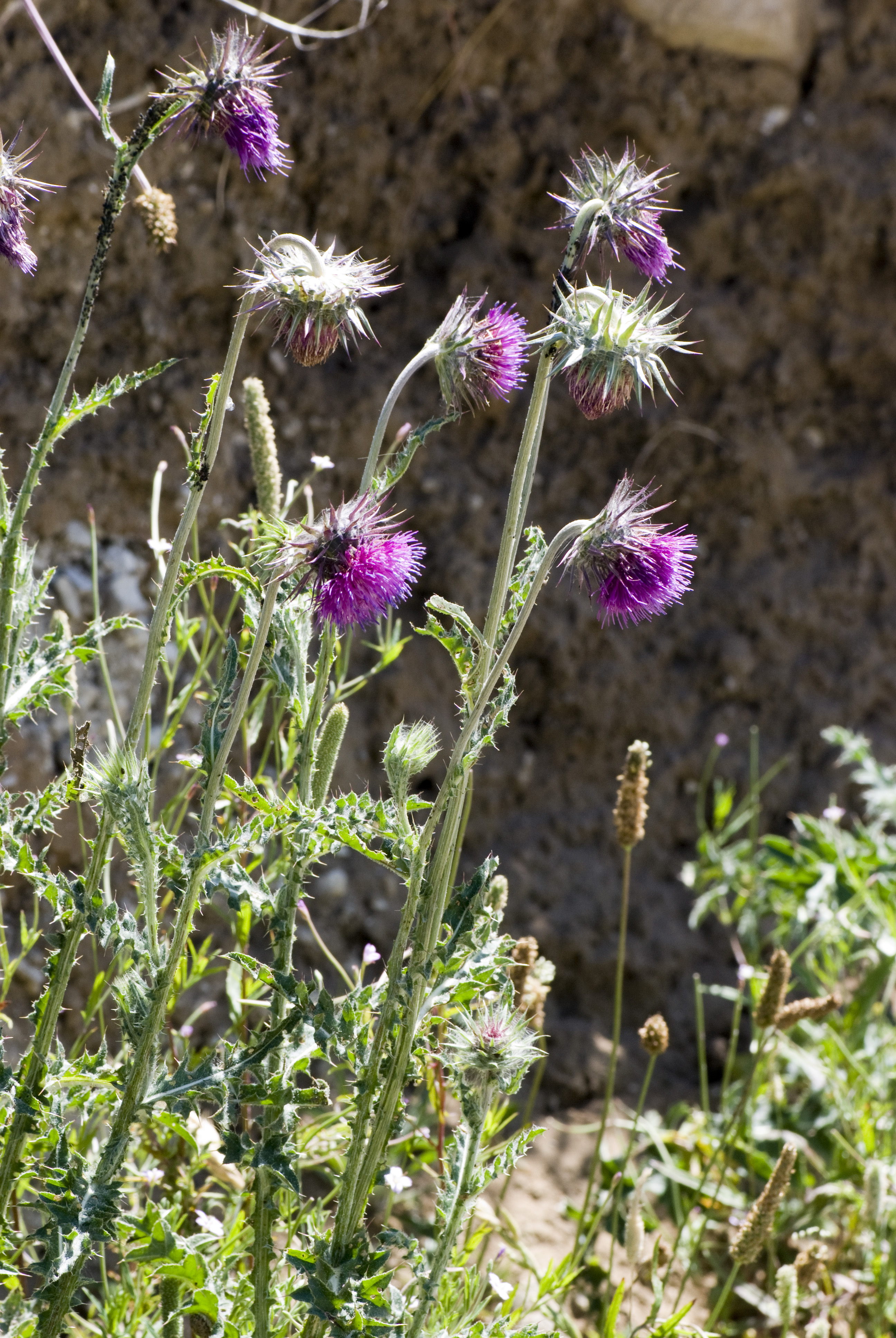 Carduus nutans Carrière de Saint-Maximin (Oise), France